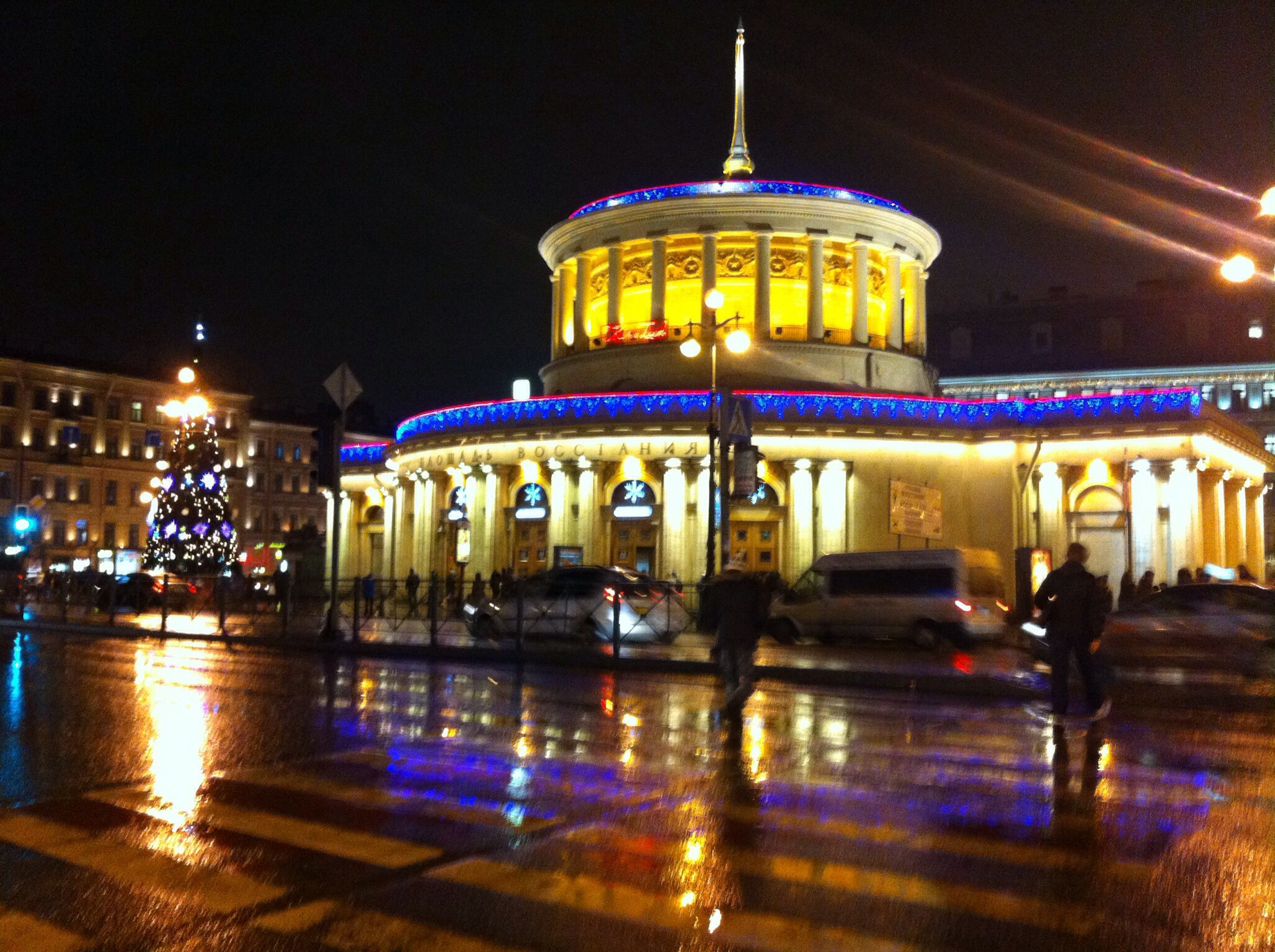 М.Площадь Востания